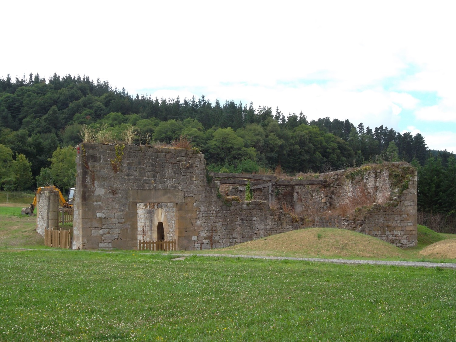 Casa torre de Zaldibar